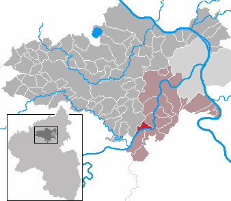 Hatzenport in Rhineland-Palatinate - district Mayen-Koblenz